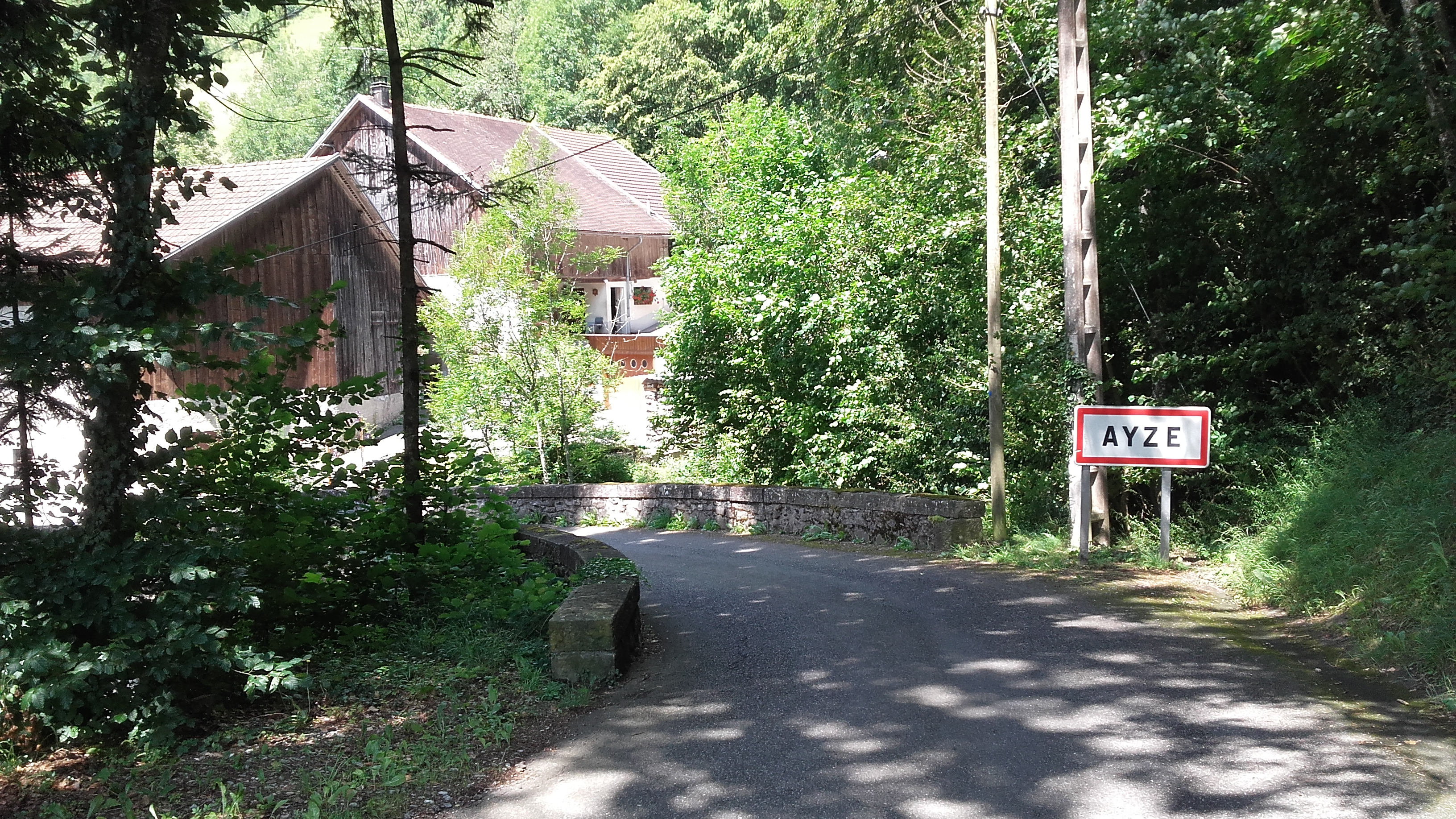 Entrée d'Ayze depuis la route de l'Eponnet